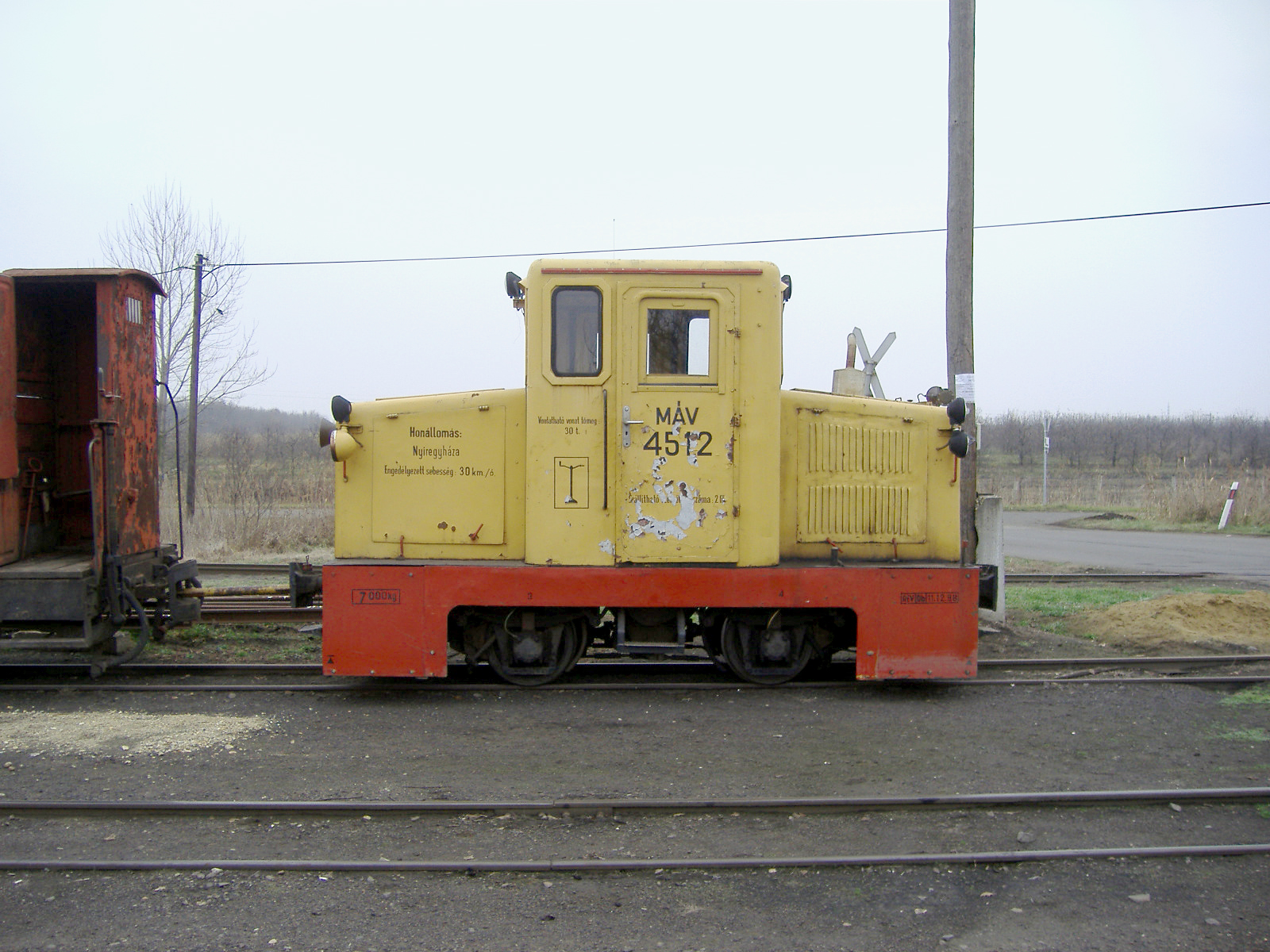 A Nyírvidéki Kisvasút C–50 típusú dízelmozdonya Herminatanya állomáson (Kótaj, Szabolcs-Szatmár-Bereg megye)